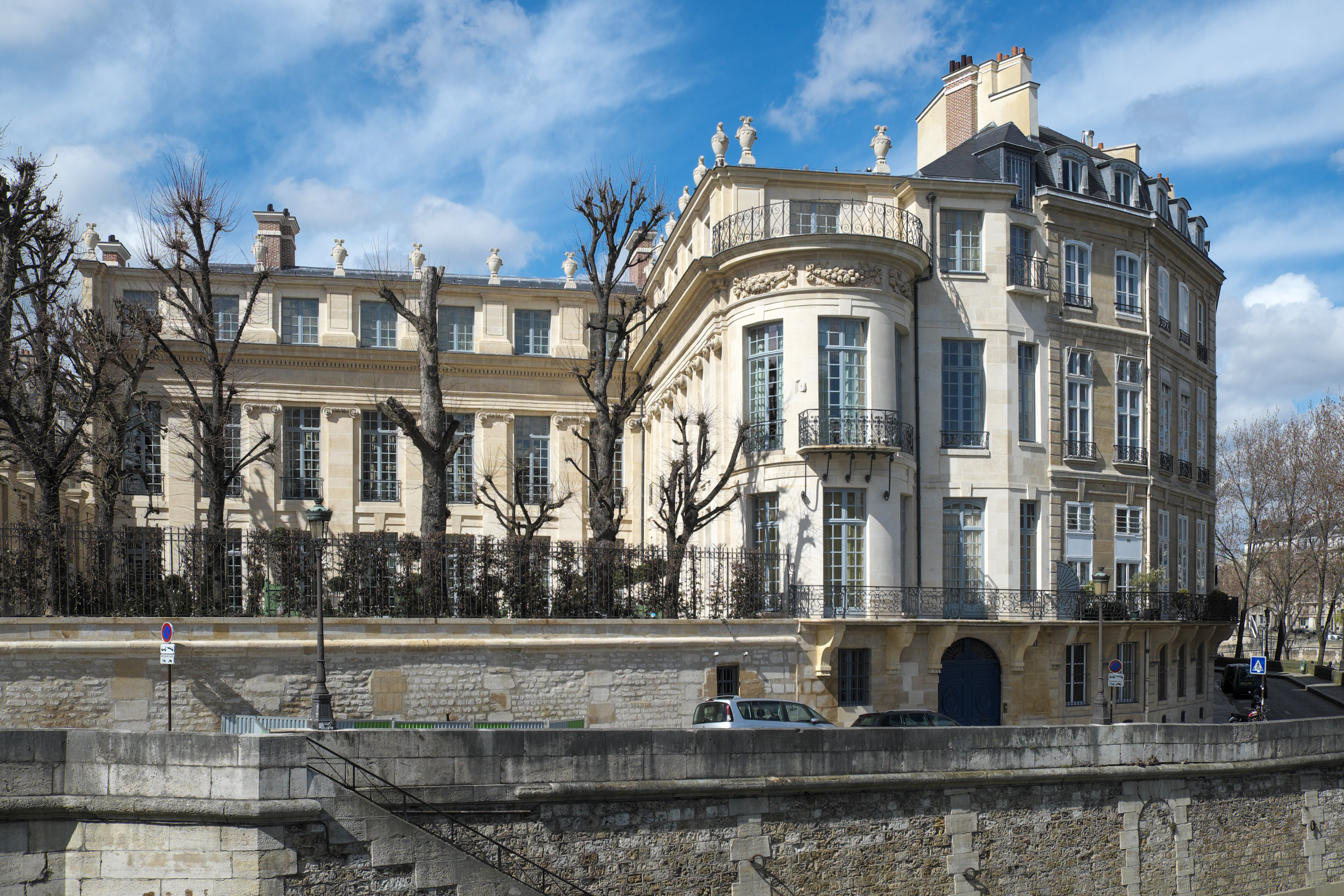 Hôtel Lambert auf der Île Saint-Louis im 4. Arrondissement in Paris (Île-de-France/Frankreich)